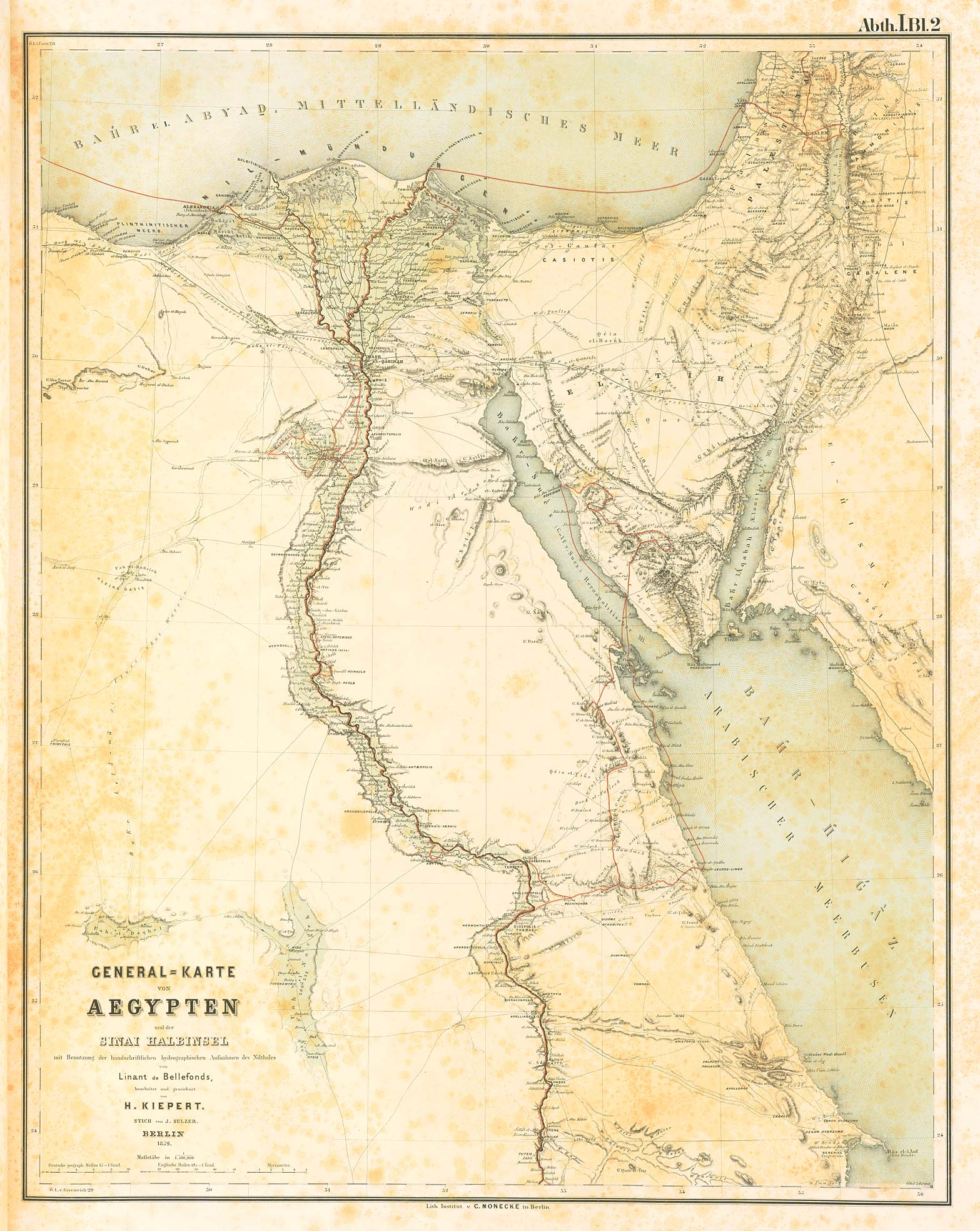 Denkmaeler aus Aegypten und Aethiopien nach den Zeichnungen der von Seiner Majestät dem Koenige von Preussen, Friedrich Wilhelm IV., nach diesen Ländern gesendeten, und in den Jahren 1842–1845 ausgeführten wissenschaftlichen Expedition auf Befehl Seiner Majestät